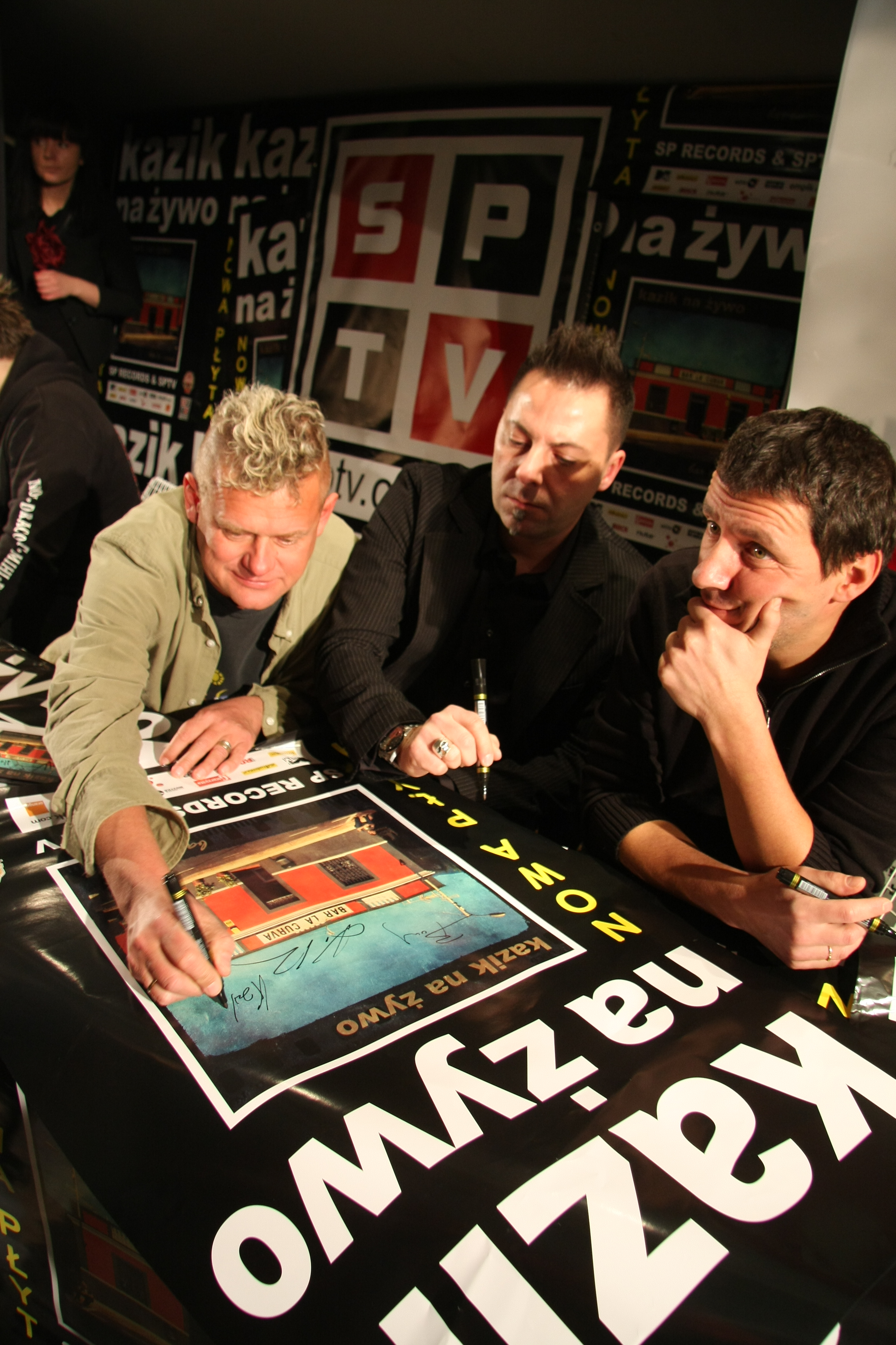 Kazik, Burza i Kwiatek w czasie podpisywania płyty Bar La Curva / Plamy na słońcu zespołu Kazik na Żywo 5 grudnia 2011 roku w warszawaskim Teatrze Rozmaitości